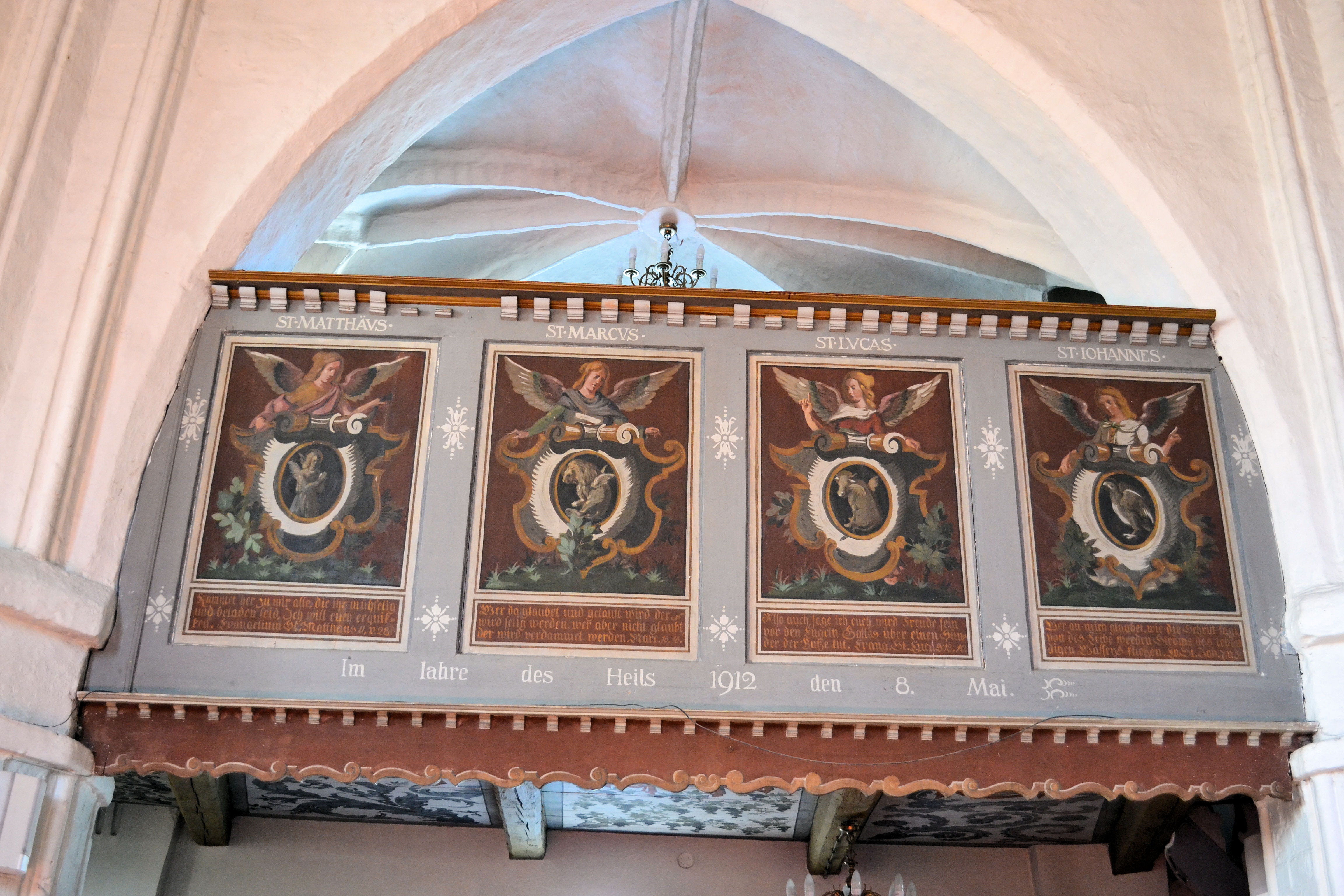 Kościół św. Gertrudy w Darłowie